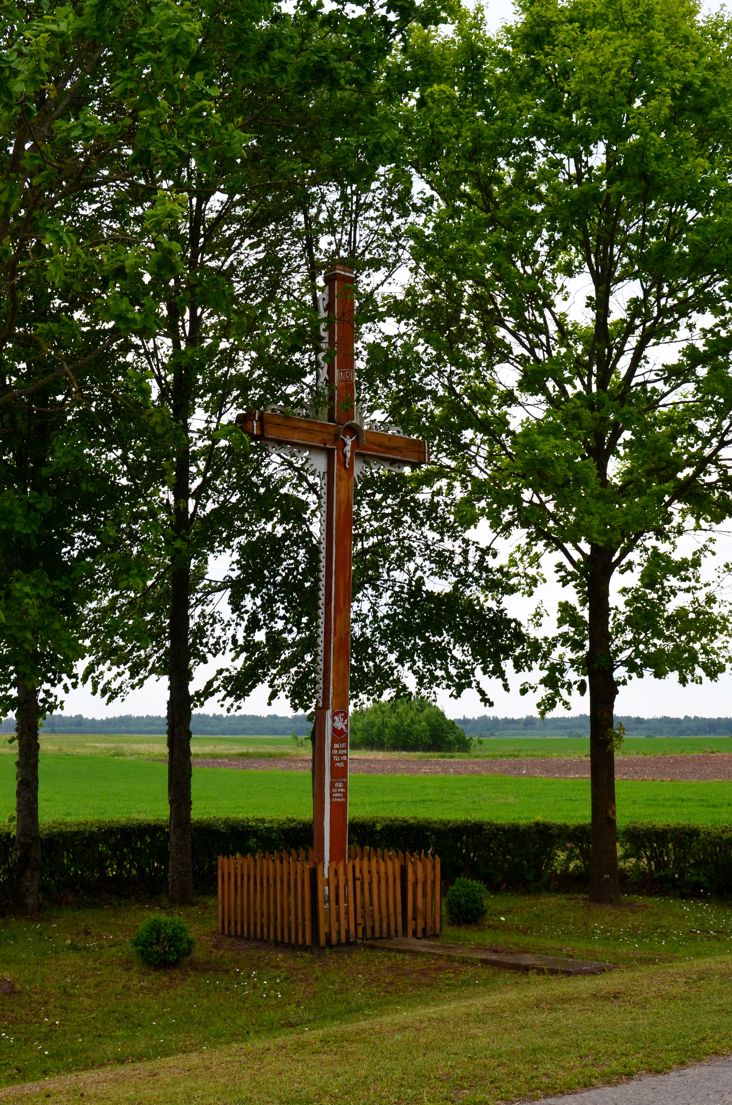 Kryžius nepriklausomybei atminti, Gulbinai, Radviliškio r.